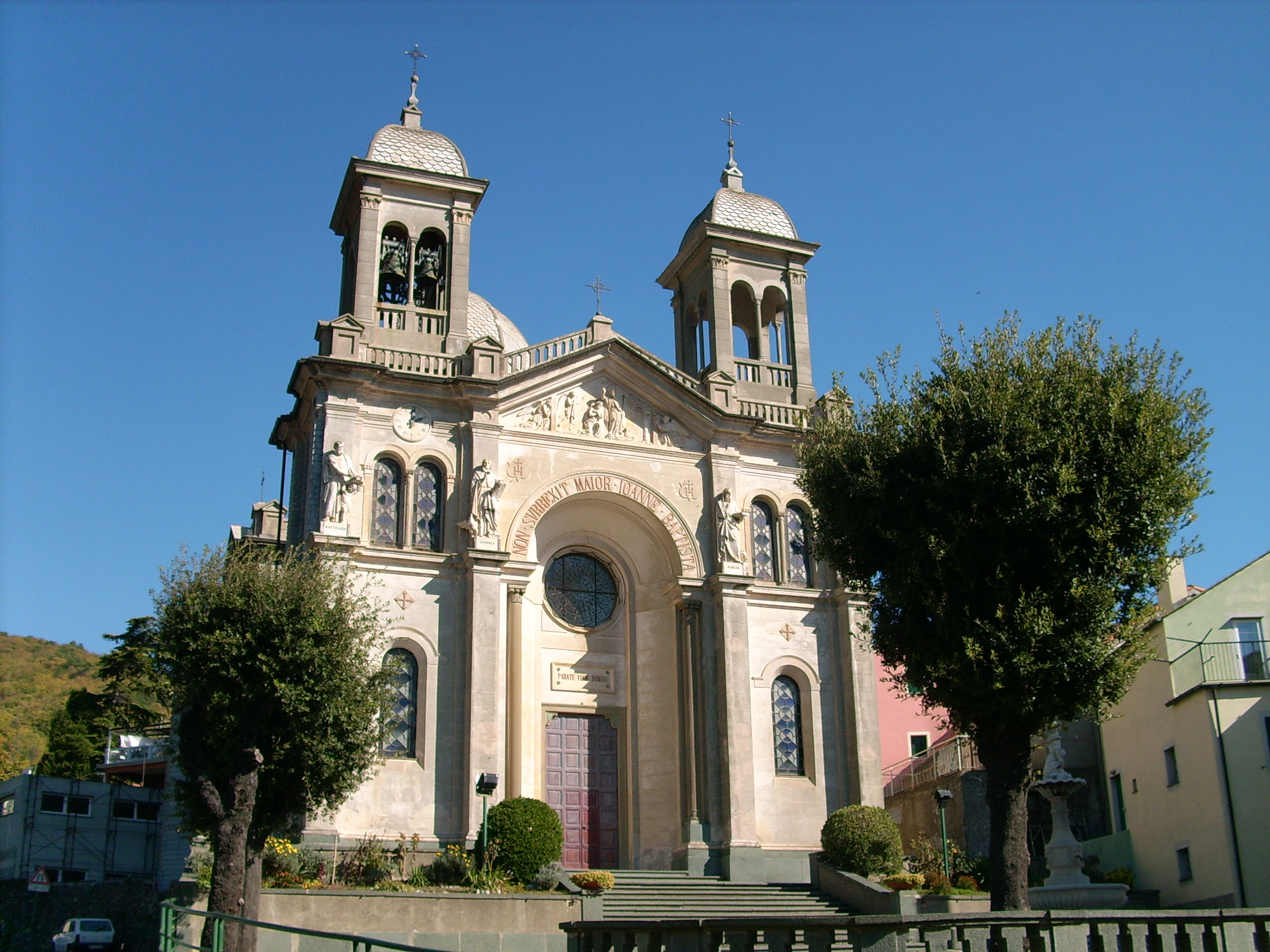 Chiesa di San Giovanni Battista presso Stella San Giovanni, Liguria, Italia.